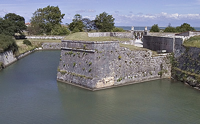 Fossé du fort de l'îŽle d'Aix Photo issue de ma banque d'images personnelle Pep.per 12 mars 2006 à 15:24 (CET)